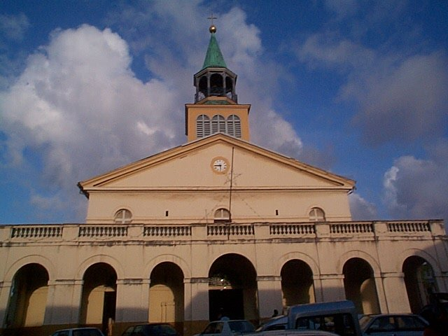 Cathédrale Saint-Sauveur à Cayenne This building is en partie classé, en partie inscrit au titre des Monuments Historiques. It is indexed in the Base Mérimée, a database of architectural heritage maintained by the French Ministry of Culture, under the references PA00105932 and IA97300281.